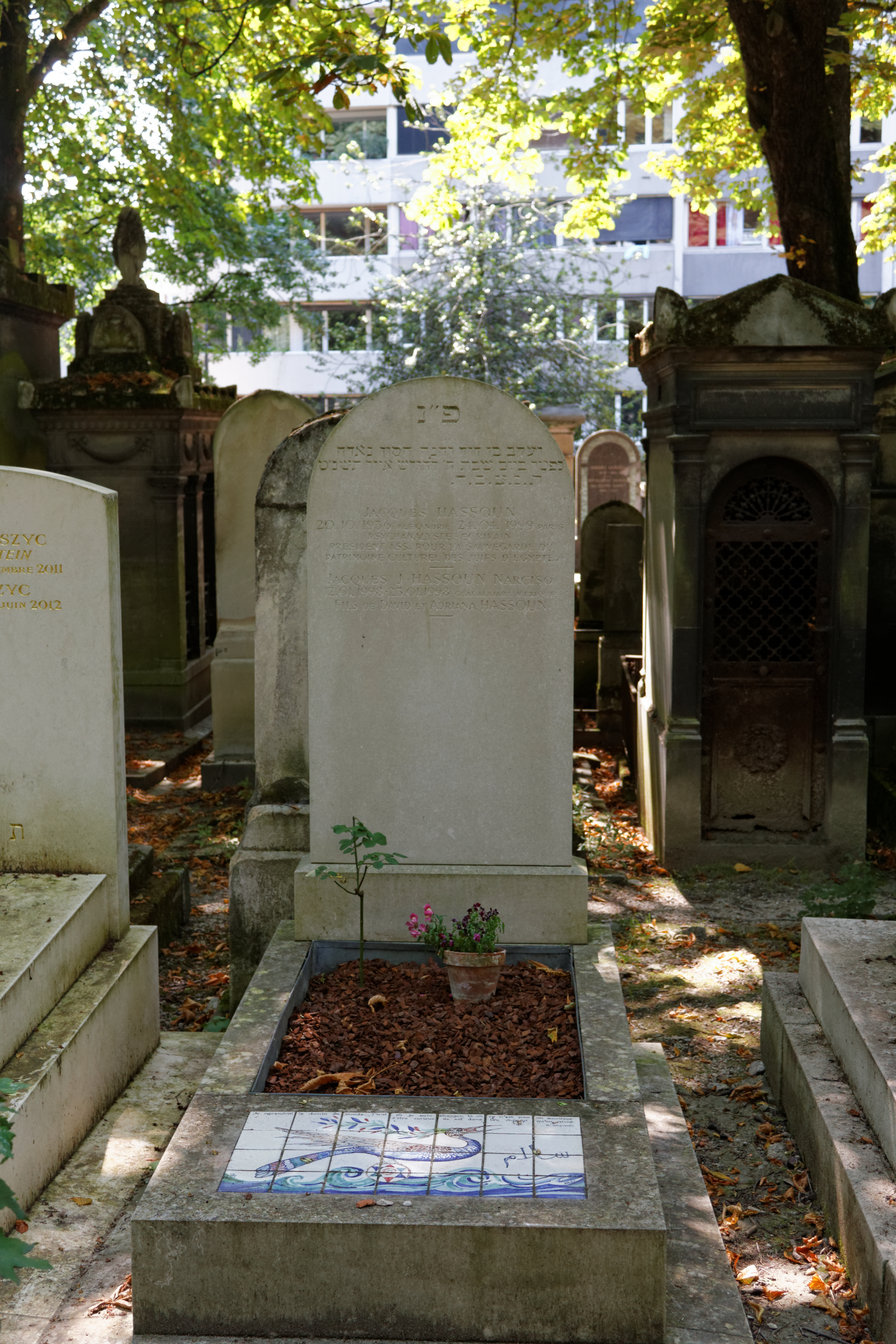 Vue d'ensemble